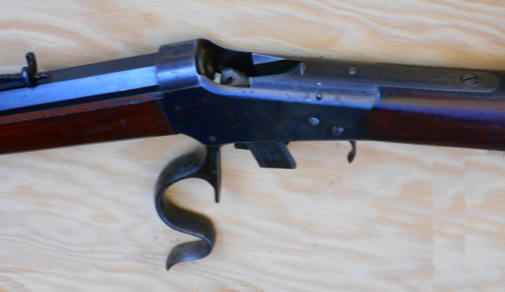 WinchM1885 offen